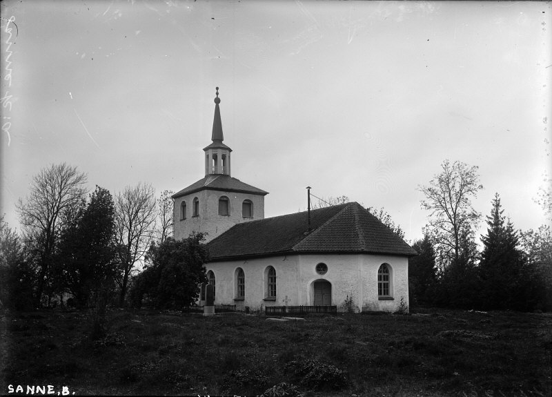 Kyrkan från sydöst. Snabbinv.